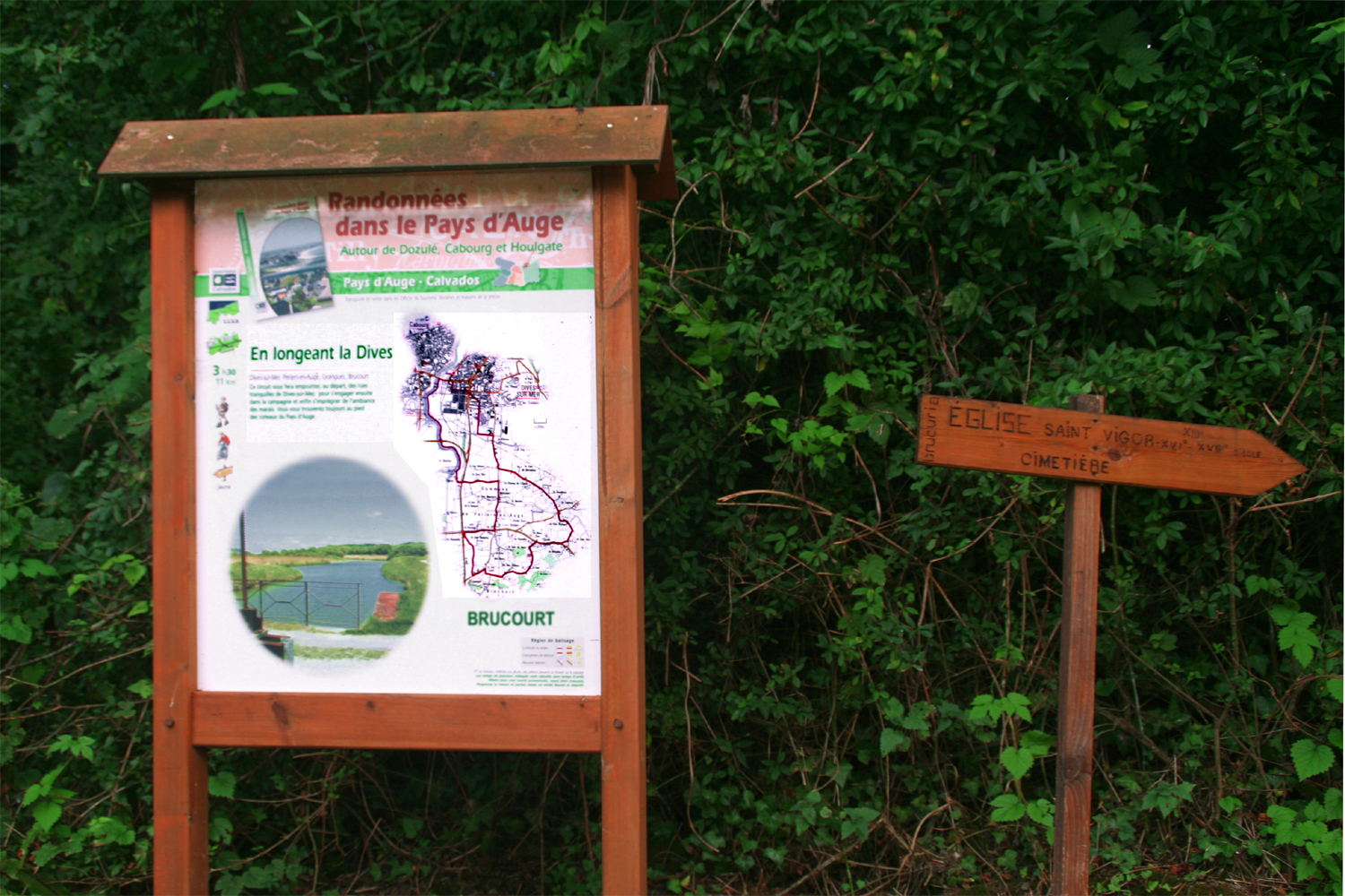 panneau indicateur et plan d'une randonée traversant la comune de Brucourt